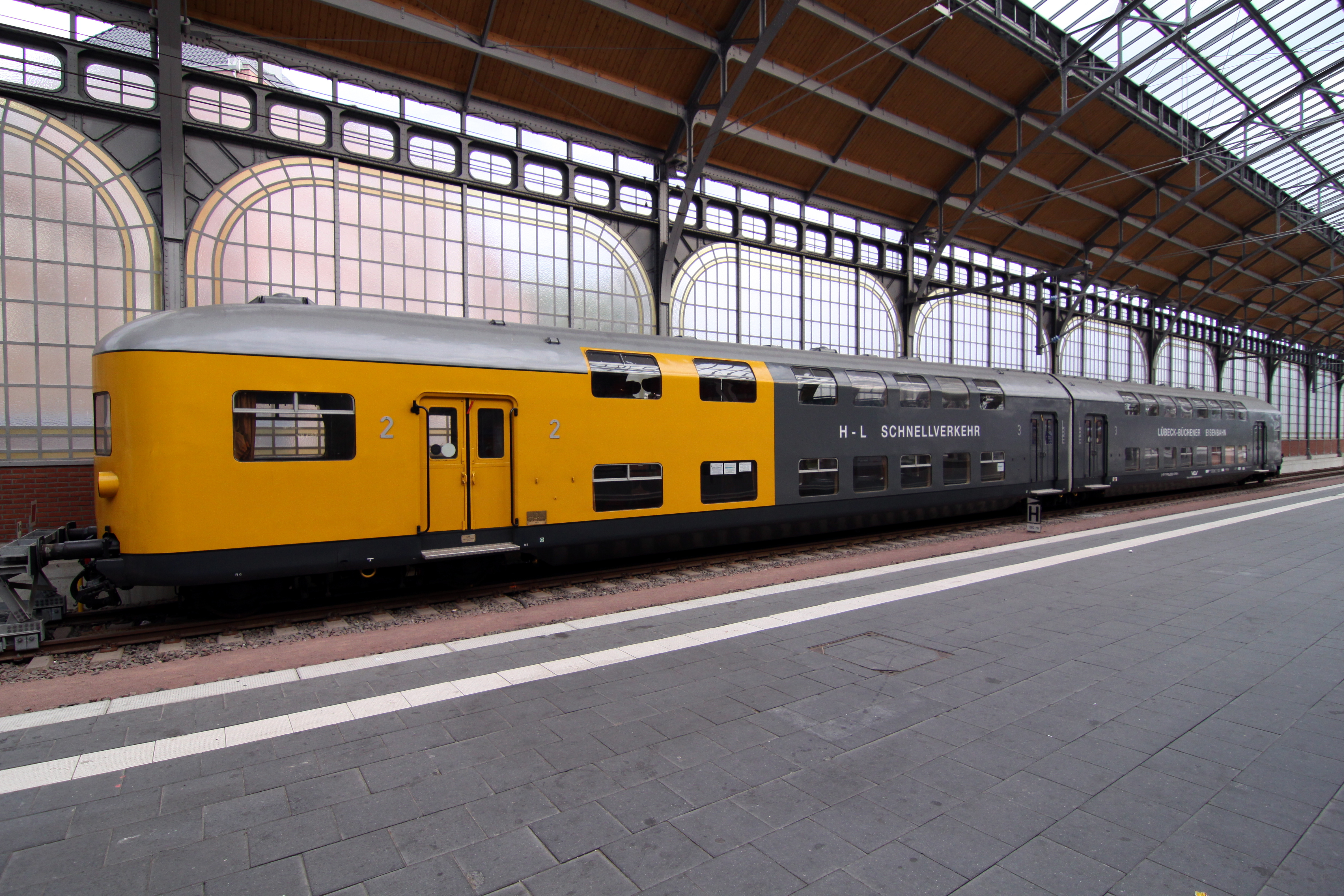 Restaurierter Doppelstockwagen der Lübeck-Büchener Eisenbahn im Hauptbahnhof Lübeck